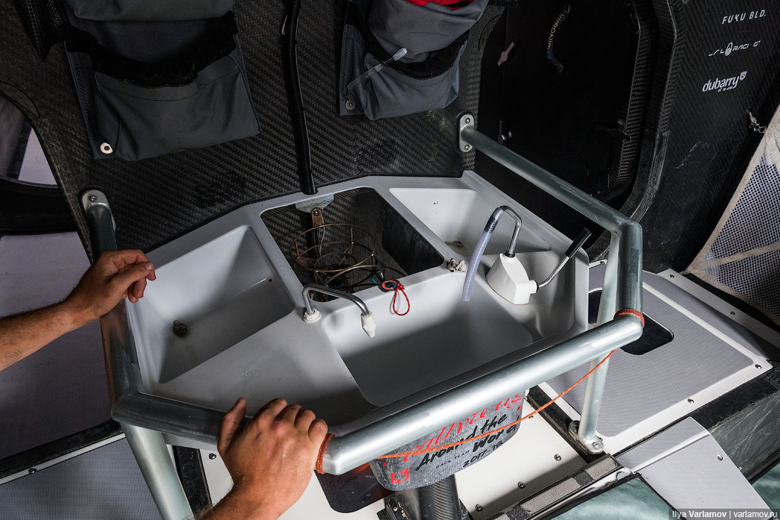 Мойка и плита на две конфорки кабуза яхты проекта Volvo Ocean 65